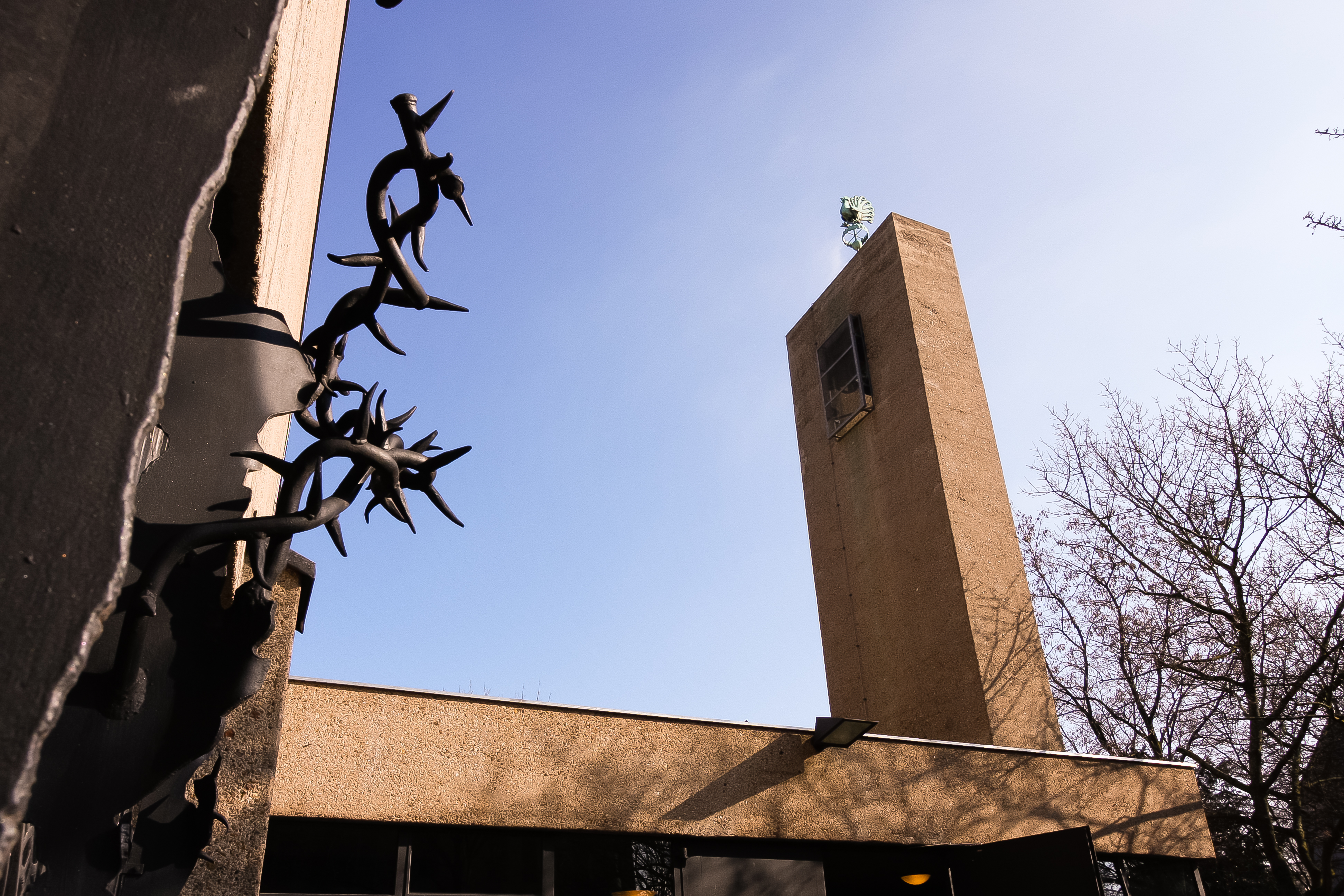 St. Johannes der Täufer, Köln, Architekt: Gottfried Böhm